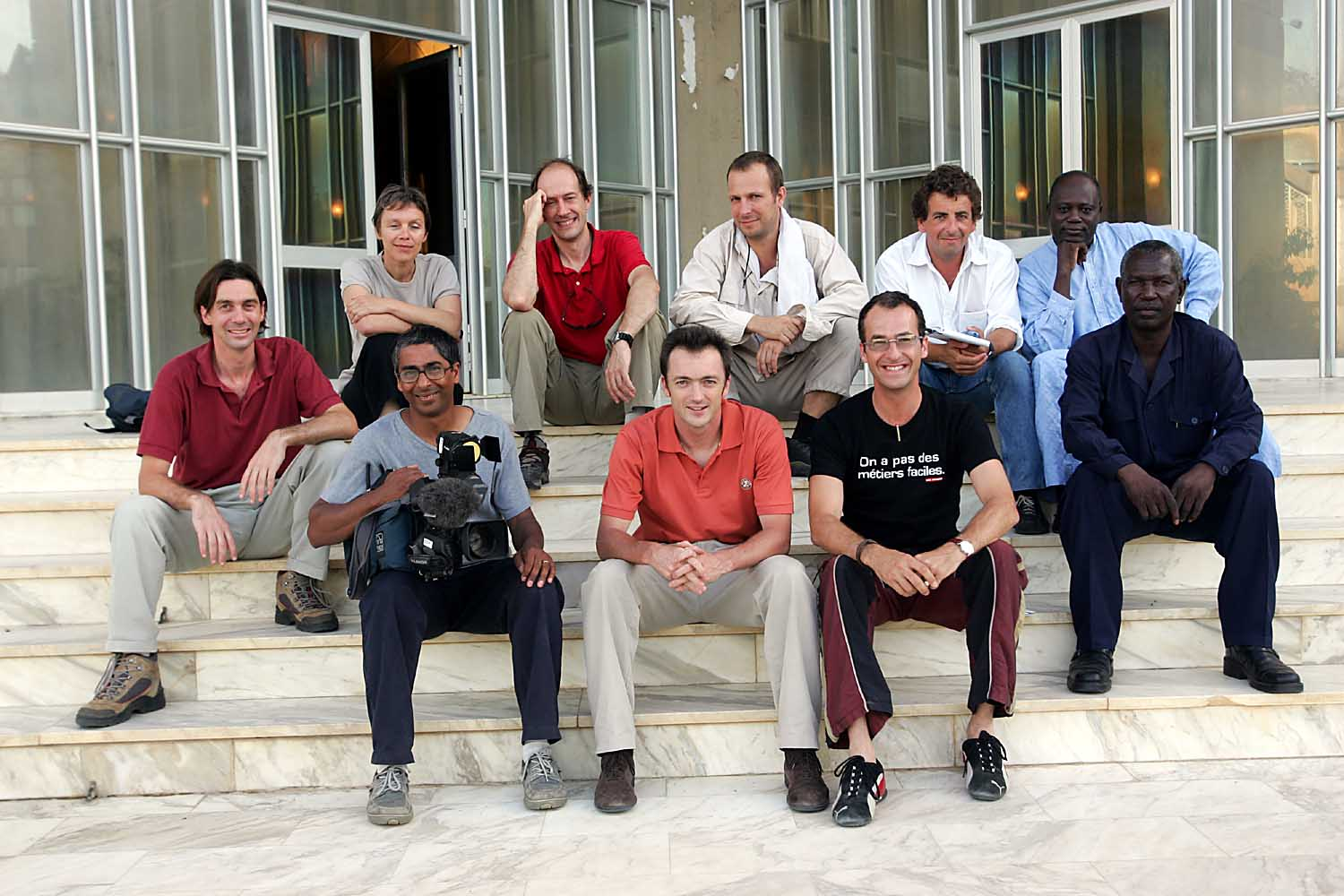 Emmanuel de Brantes au Tchad entouré de Journalistes et de membres de Care-France en 2004